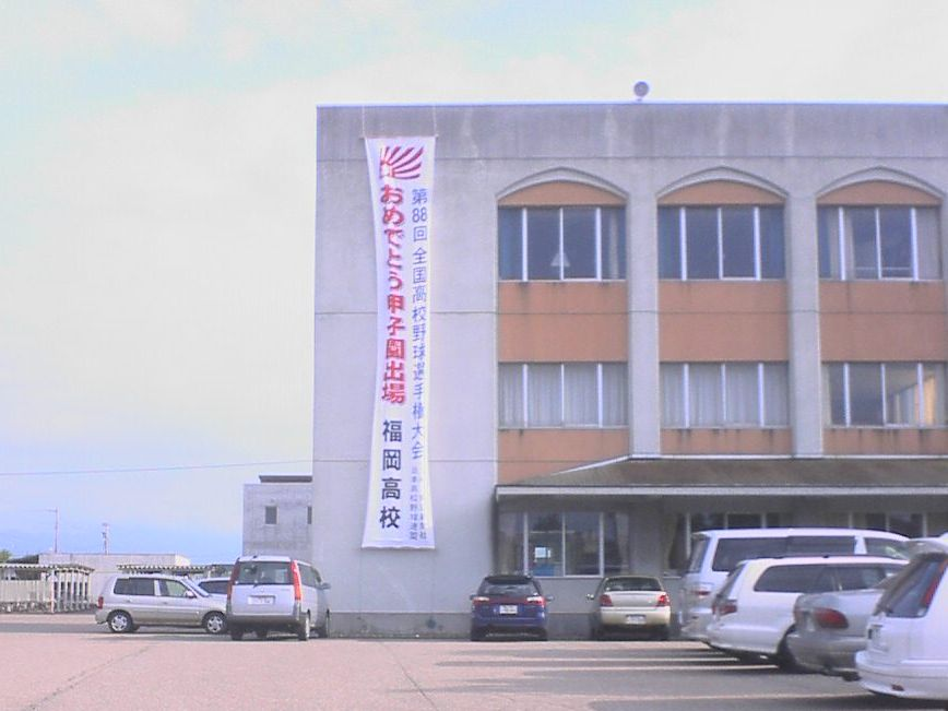 第88回全国高等学校野球選手権大会に富山県立福岡高等学校野球部が出場を決定した際、校舎に掲示された垂れ幕